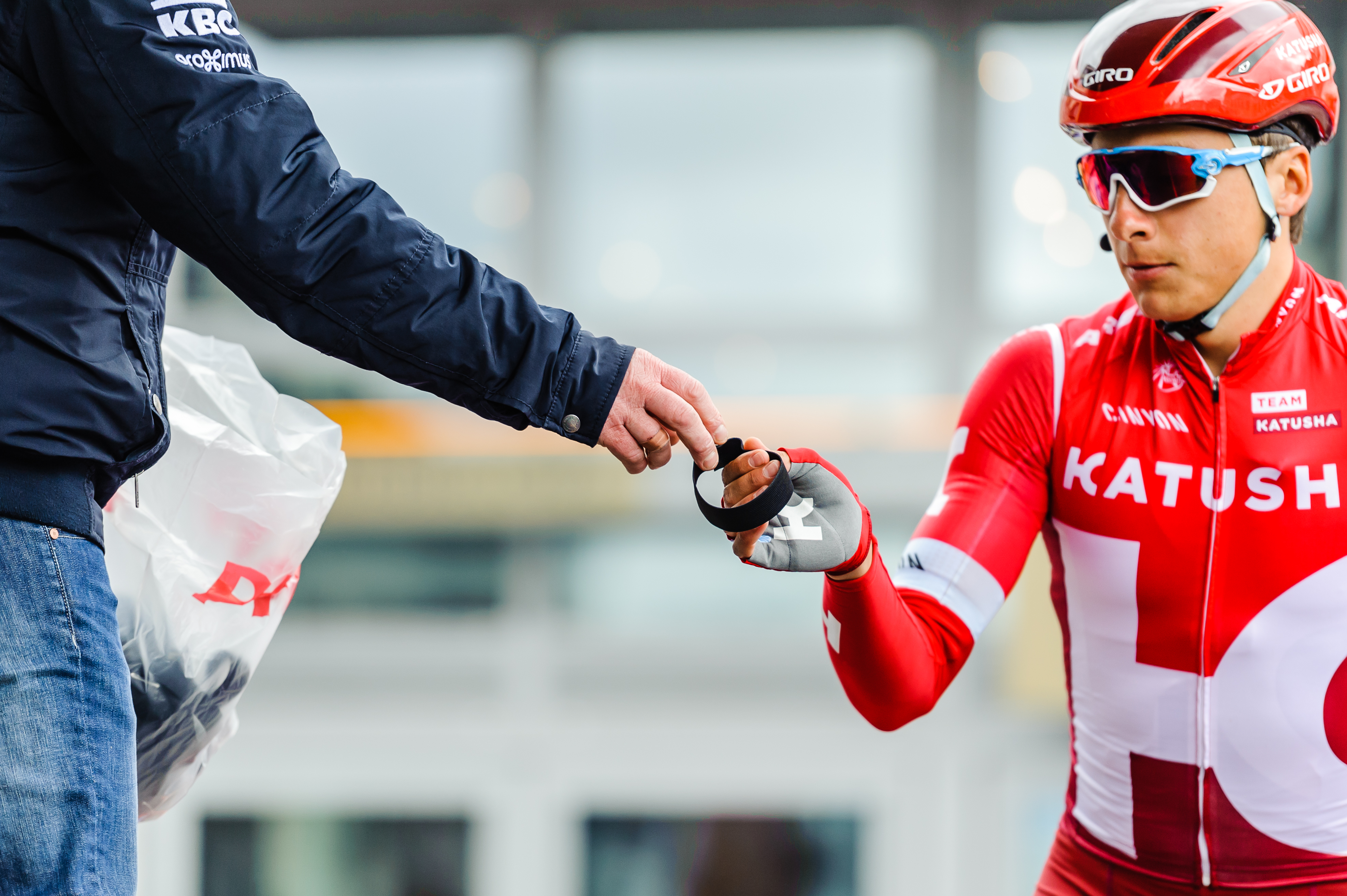 Daags na de aanslagen staat sereniteit centraal in Roeselare. Op de Grote Markt regeert de stilte - applausgeluiden blijven uit. Op het startpodium laat speaker Michel Wuyts zijn traditionele publieksopwarmende aankondigingen achterwege en leest kort voor de start een brief voor, ter nagedachtenis van de slachtoffers. Alle renners krijgen, vooraleer het startblad te tekenen, een rouwband aangereikt door de organisatie.